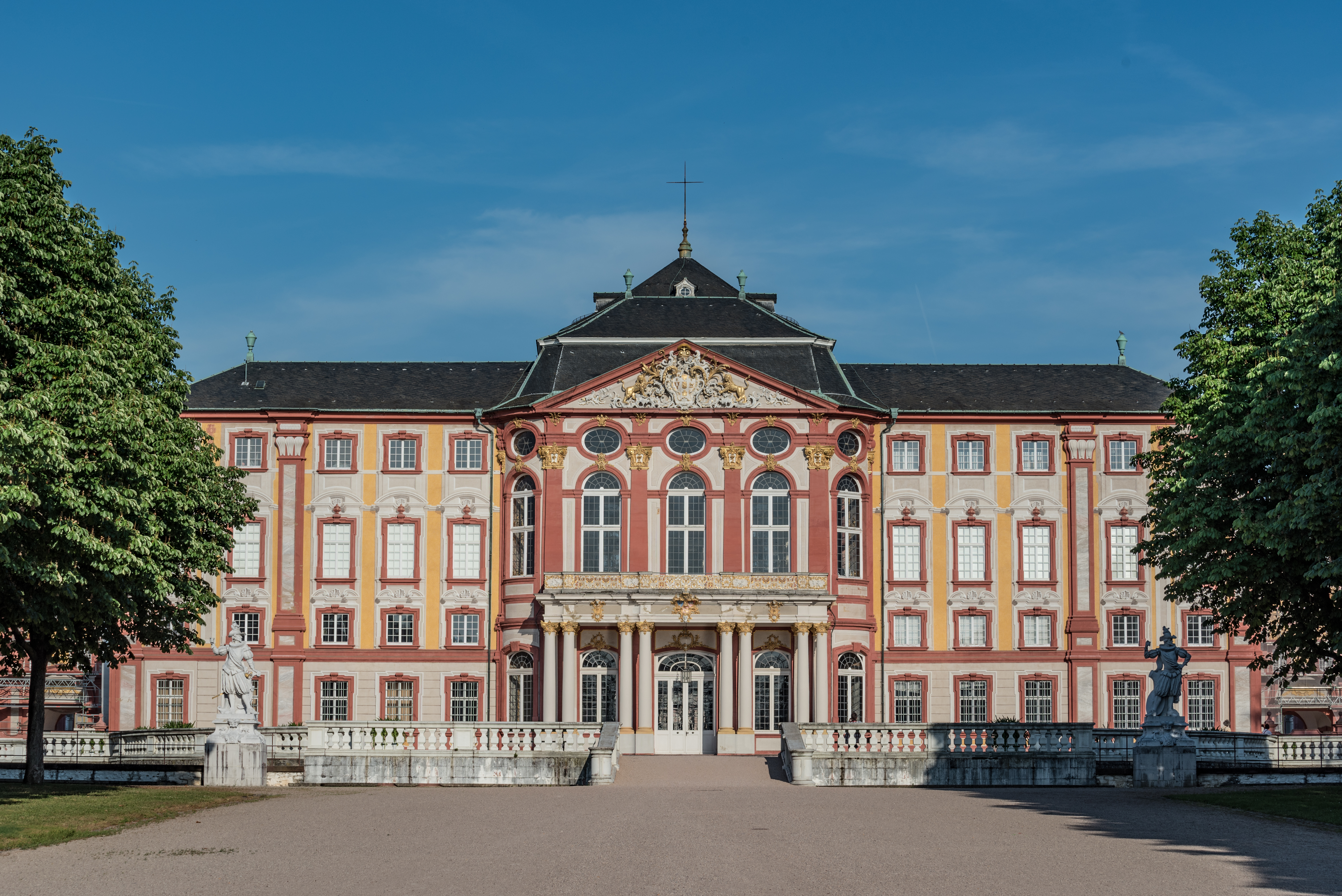 Bruchsal, Schloss, Corps de Logis, Ansicht von Westen